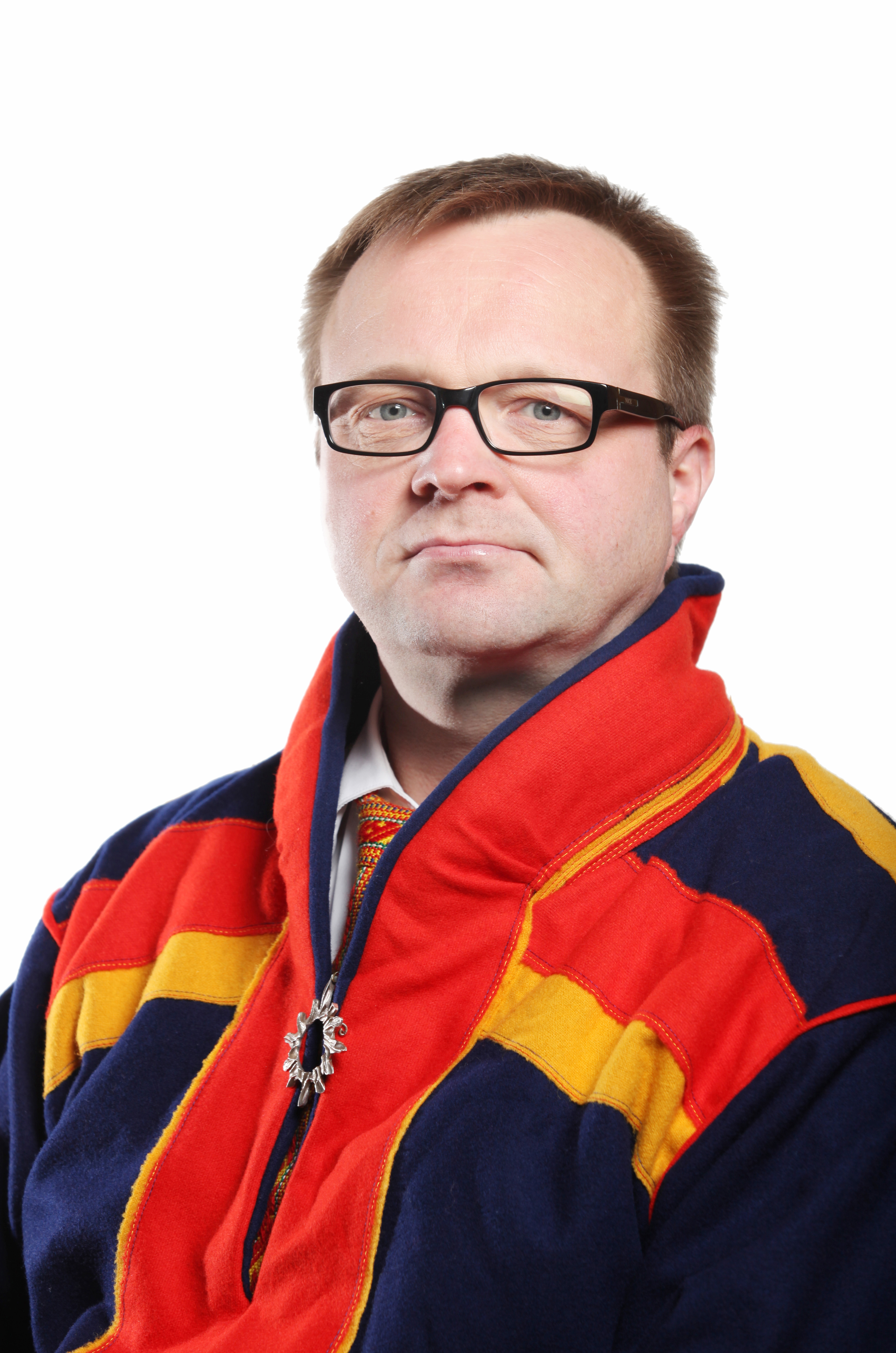 Plenumsleder. Medlem av oppvekst-, omsorg- og utdanningskomitéen. Foto: Kenneth Hætta/Sametinget